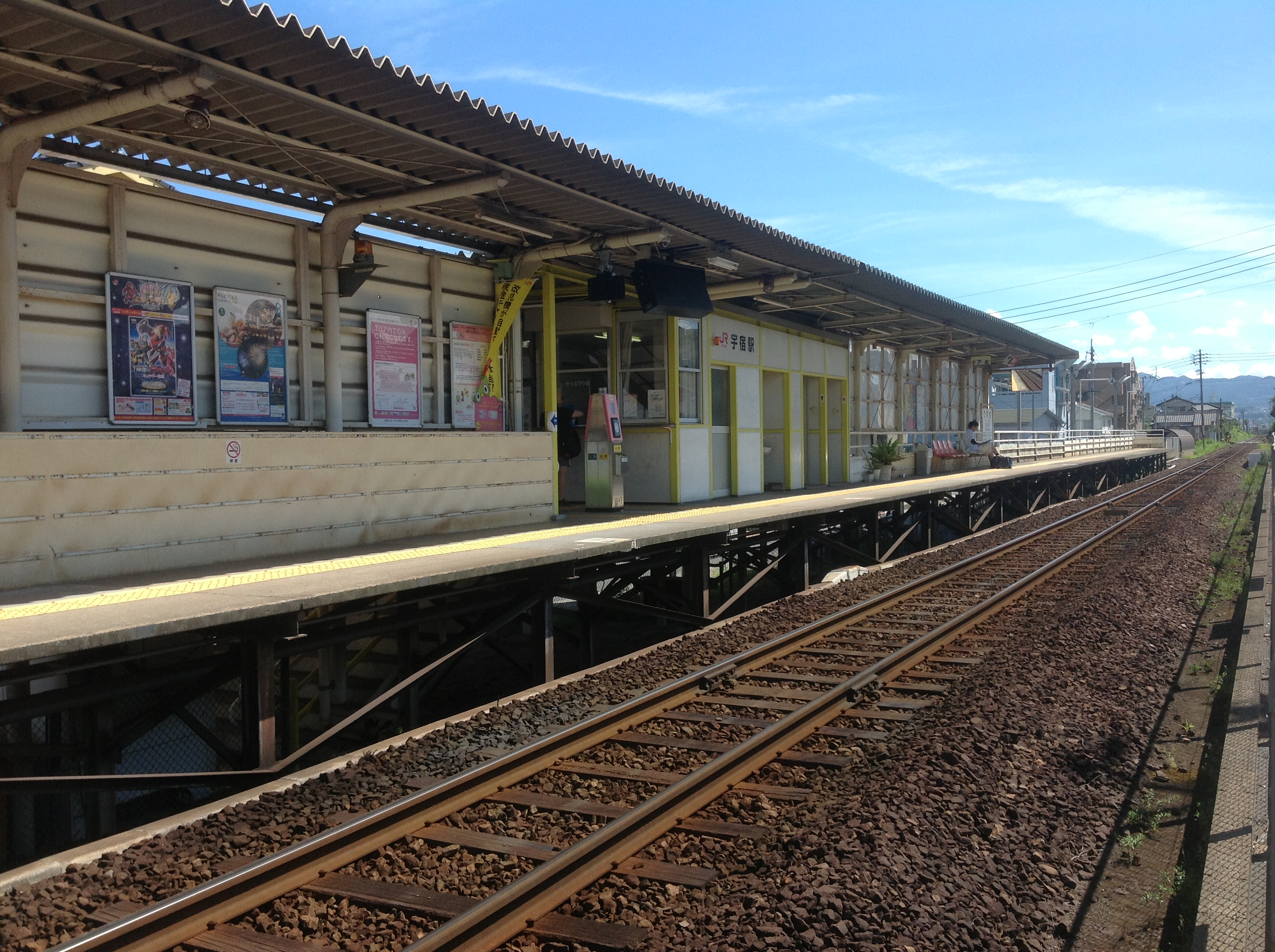 宇宿駅ホーム